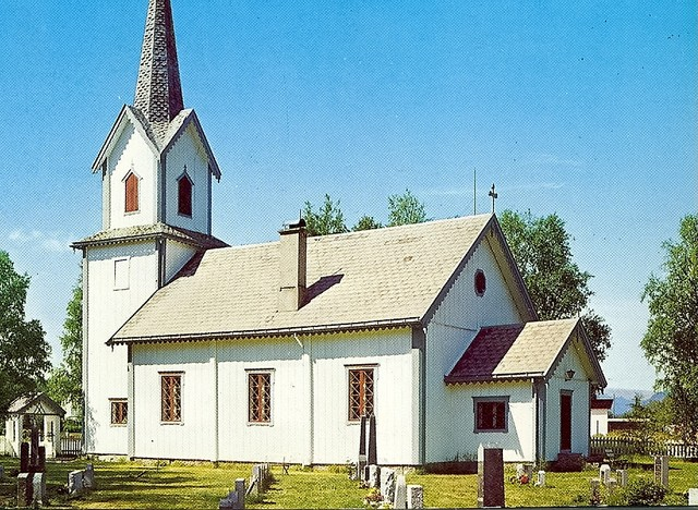 Ljørdalen kirke